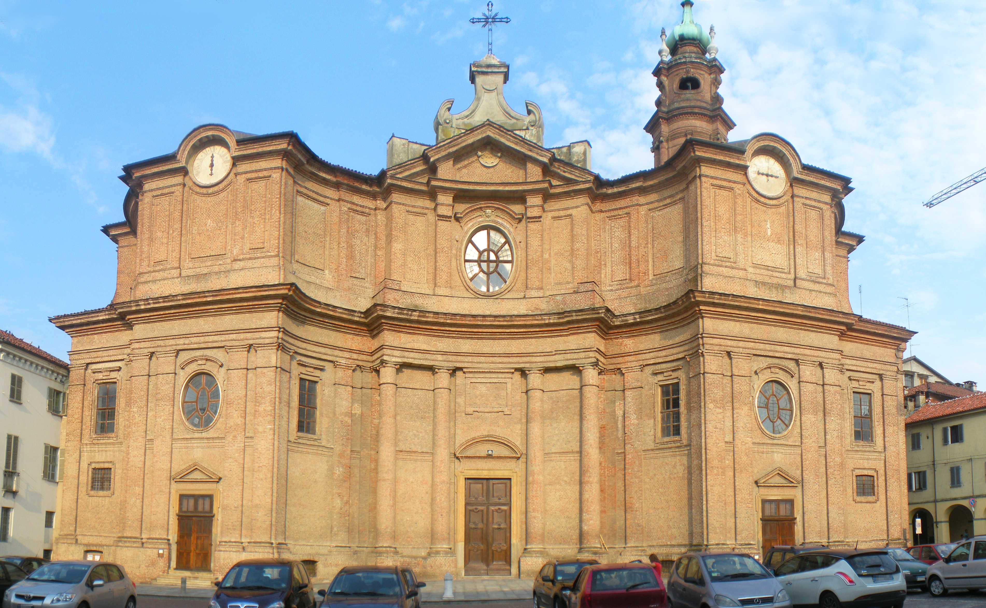 Facciata del Duomo dei S.S. Giovanni Battista e Remigio a Carignano, in provincia di Torino.